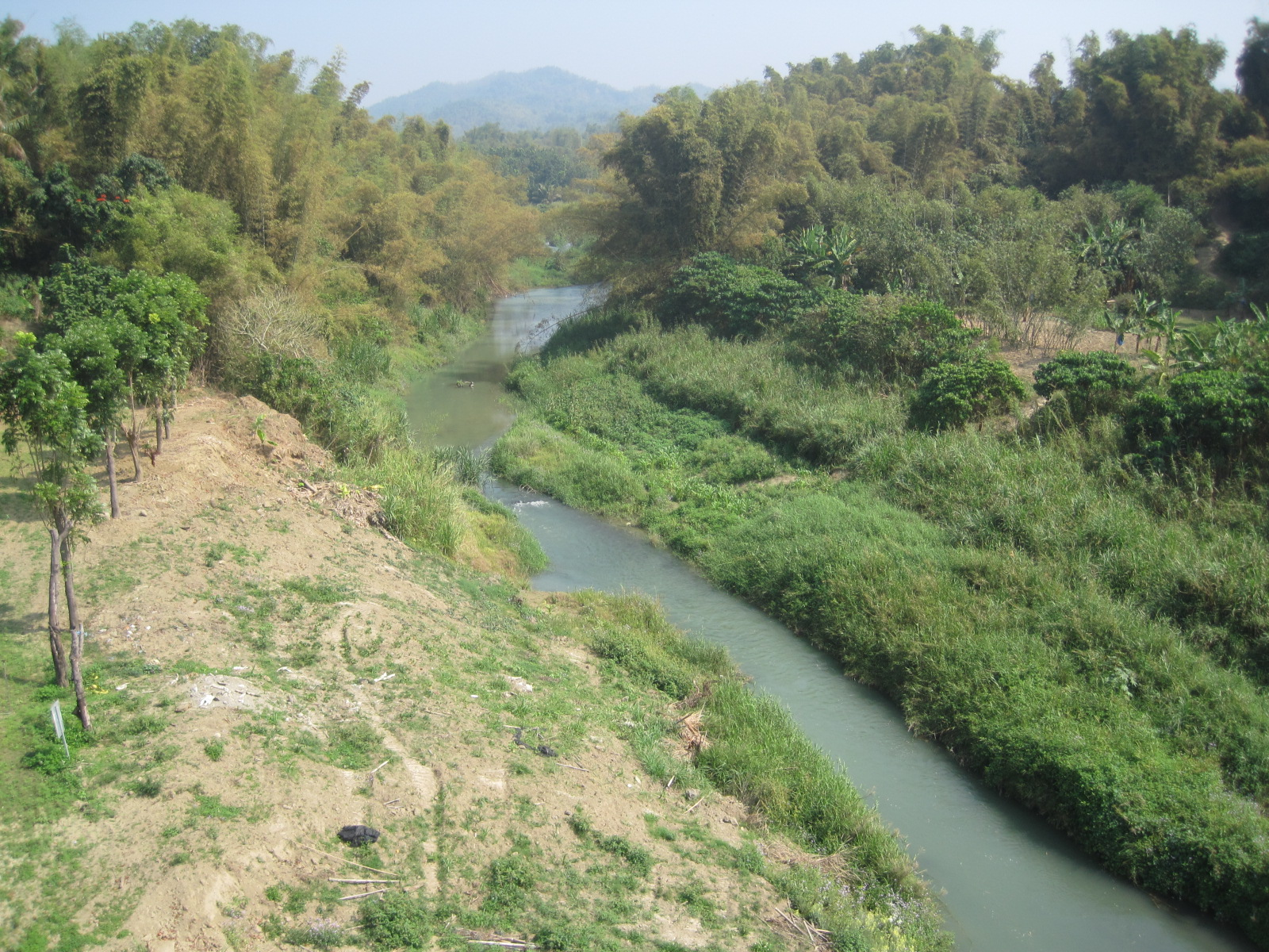 內門紫竹寺附近的二仁溪河段，為內門區觀亭里與內南里的界線。